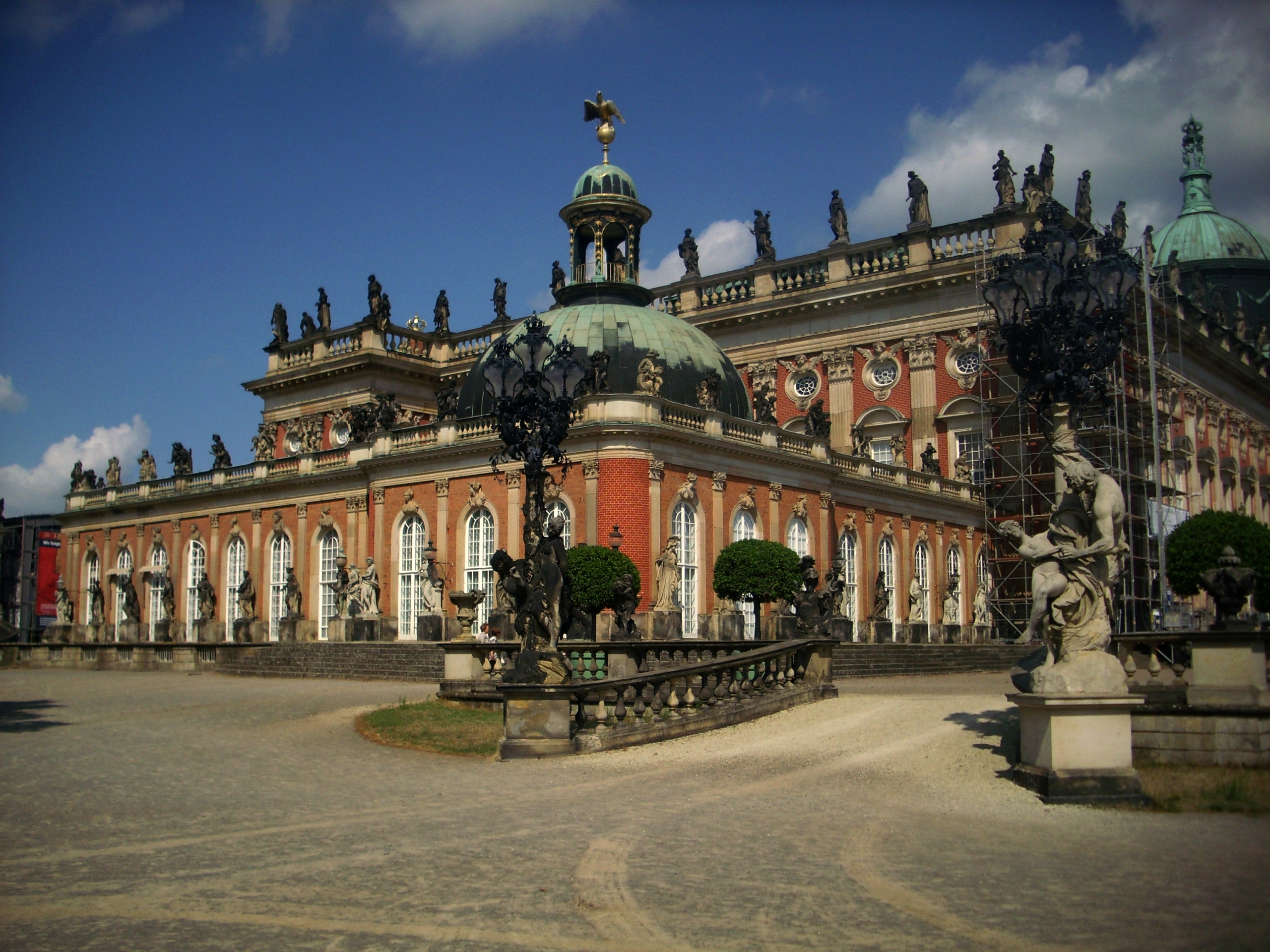 Potsdam Neues Palais, ingang